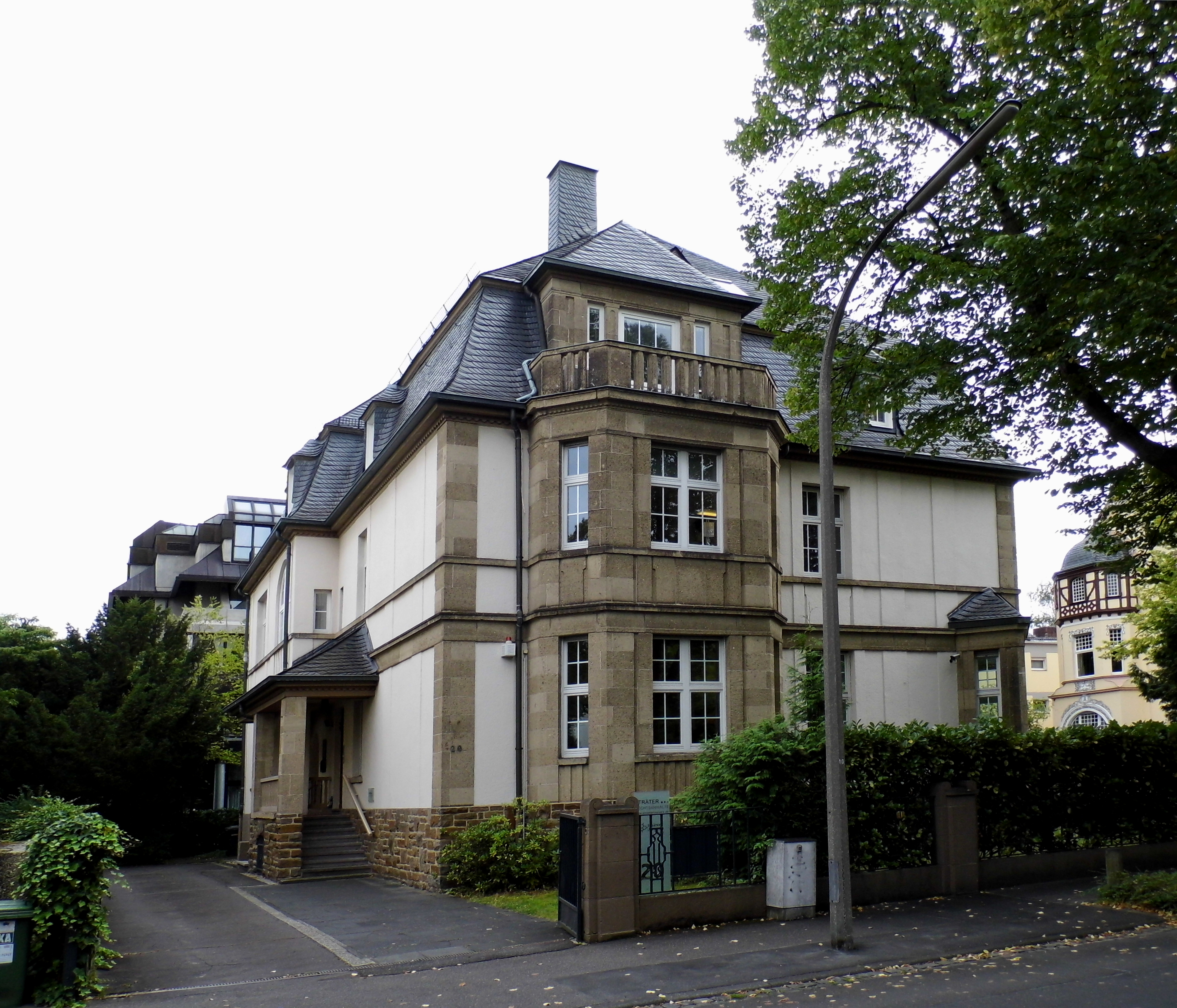 Denkmalgeschützte Villa Kronprinzenstraße 20 (ehemalige Botschaft von Chile) in Bad Godesberg, Ortsteil Godesberg-Villenviertel